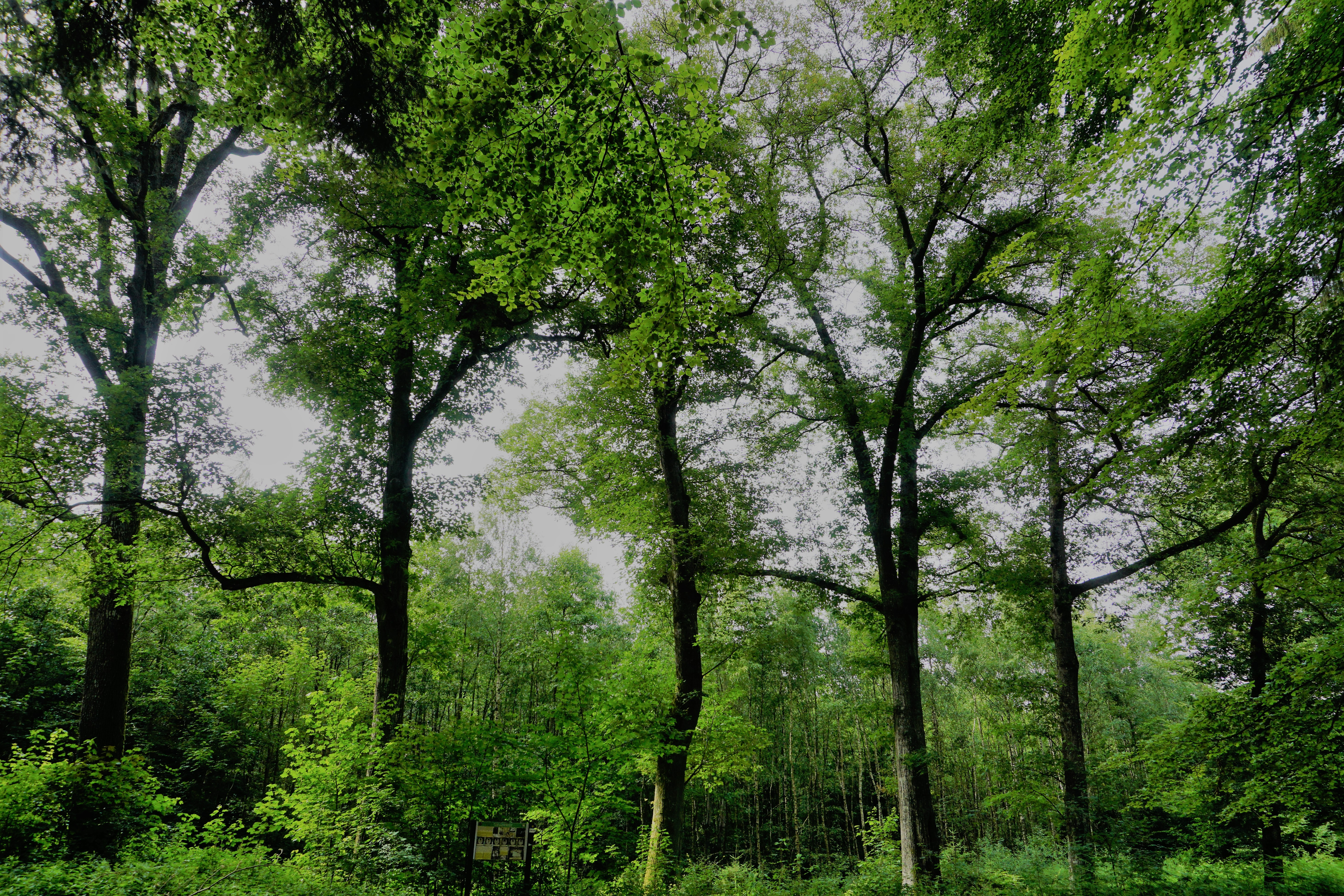 D'Prinzessinnen-Eechen am Gréngewald.